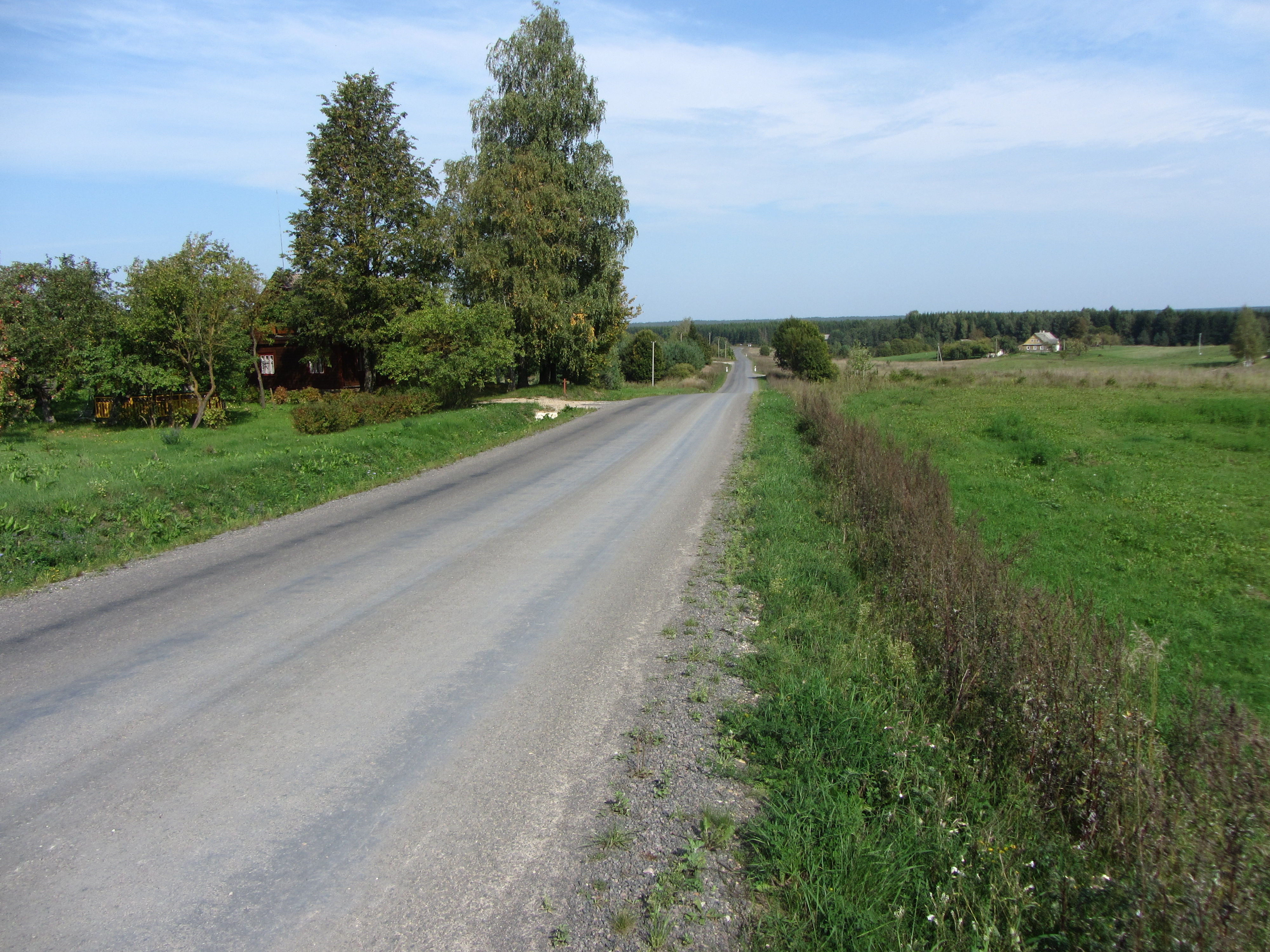 Inturkės sen., Lithuania